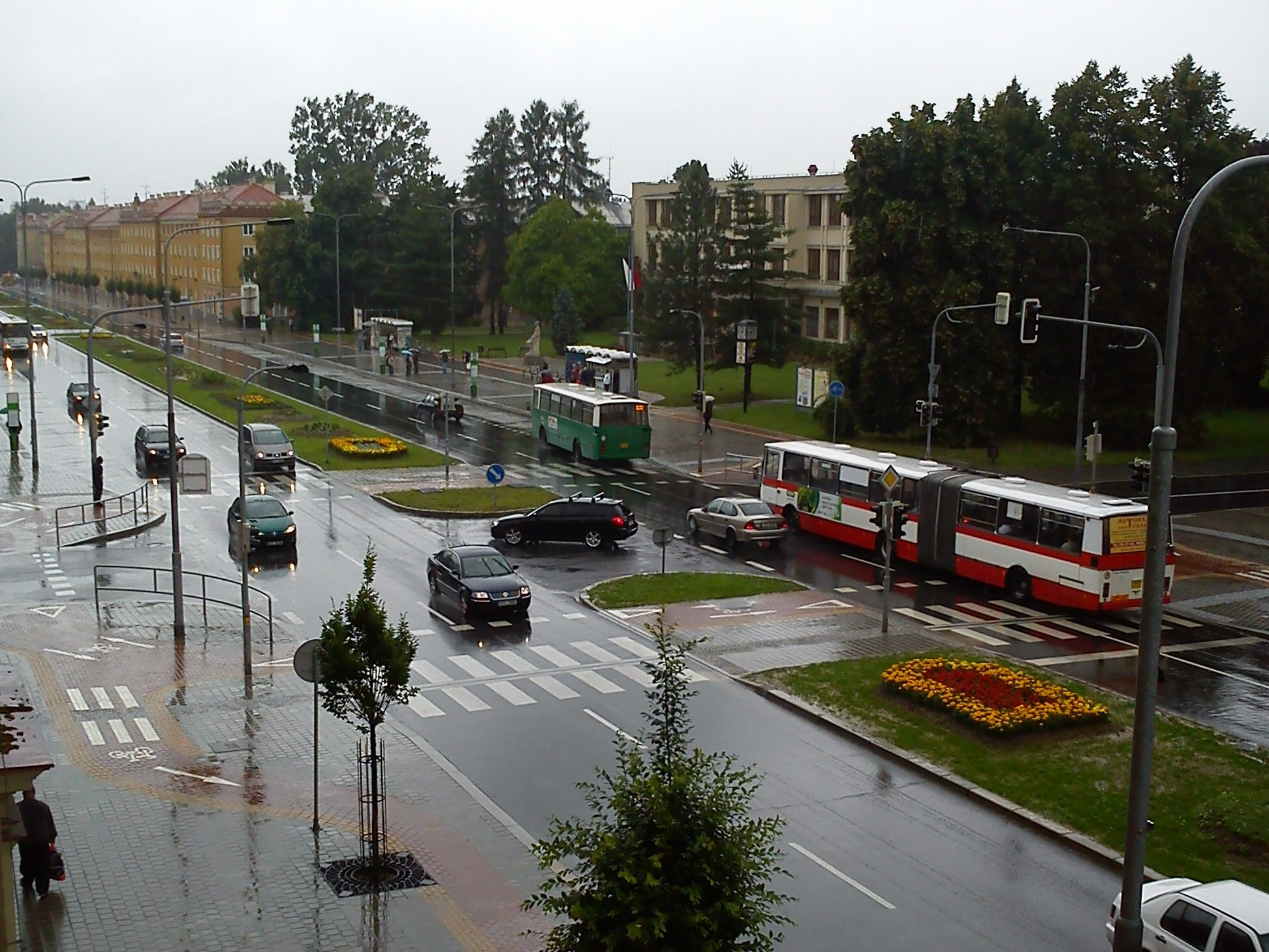 Světelná křižovatka v centru Havířova v roce 2011